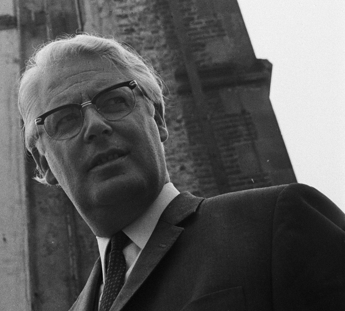 Burgemeester Kok van Edam bij de toren